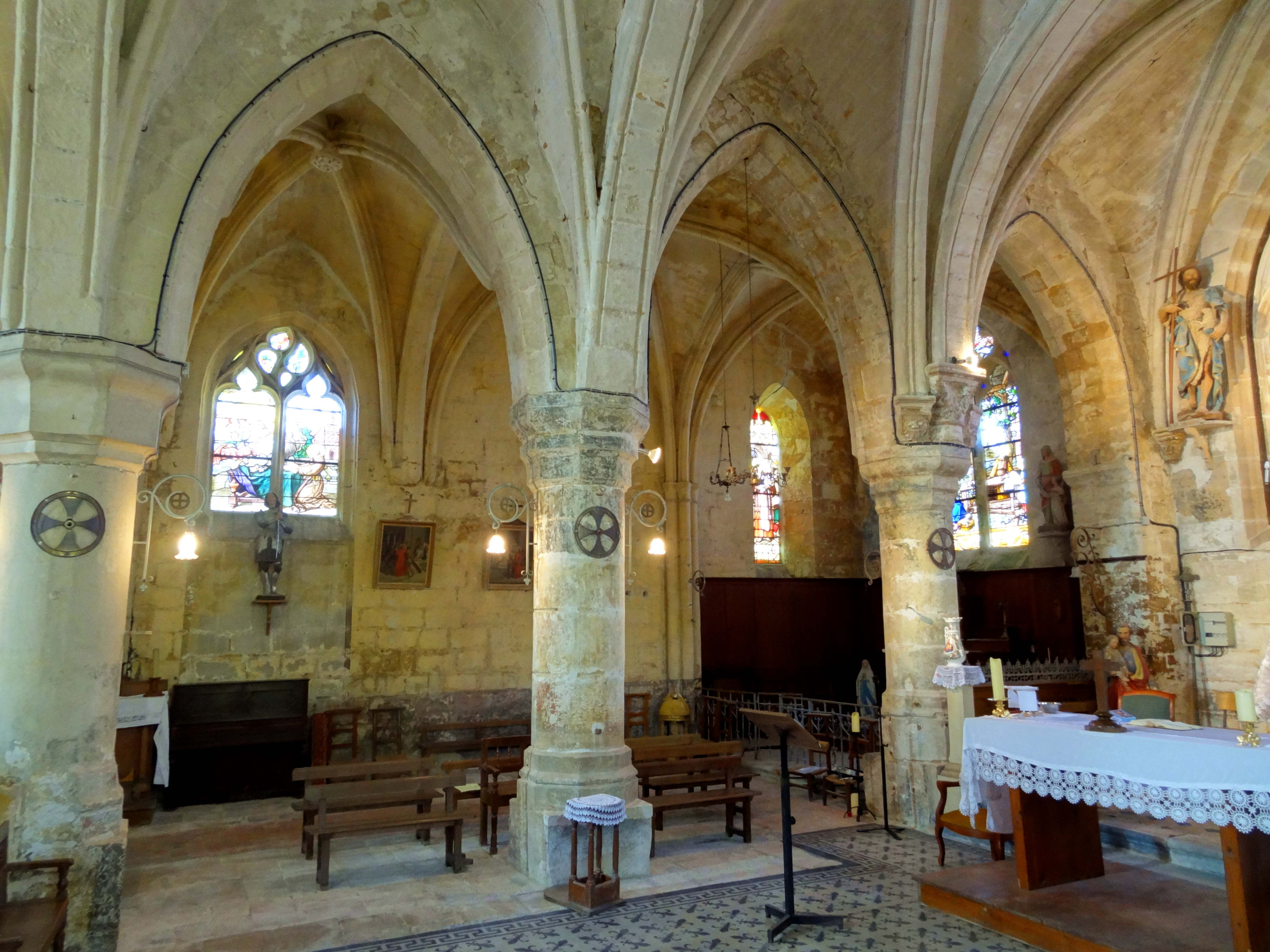 Intérieur de l'église - voir titre.